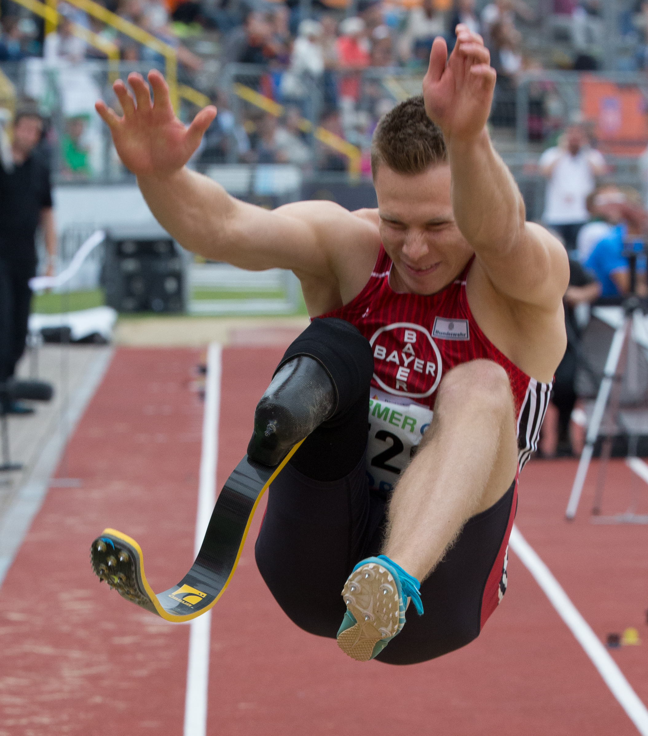 114. Deutsche Leichtatheltik Meisterschaften 2014 in Ulm - Weitsprung Männer: Markus REHM - Alle Ergebnisse/Teilnehmer unter